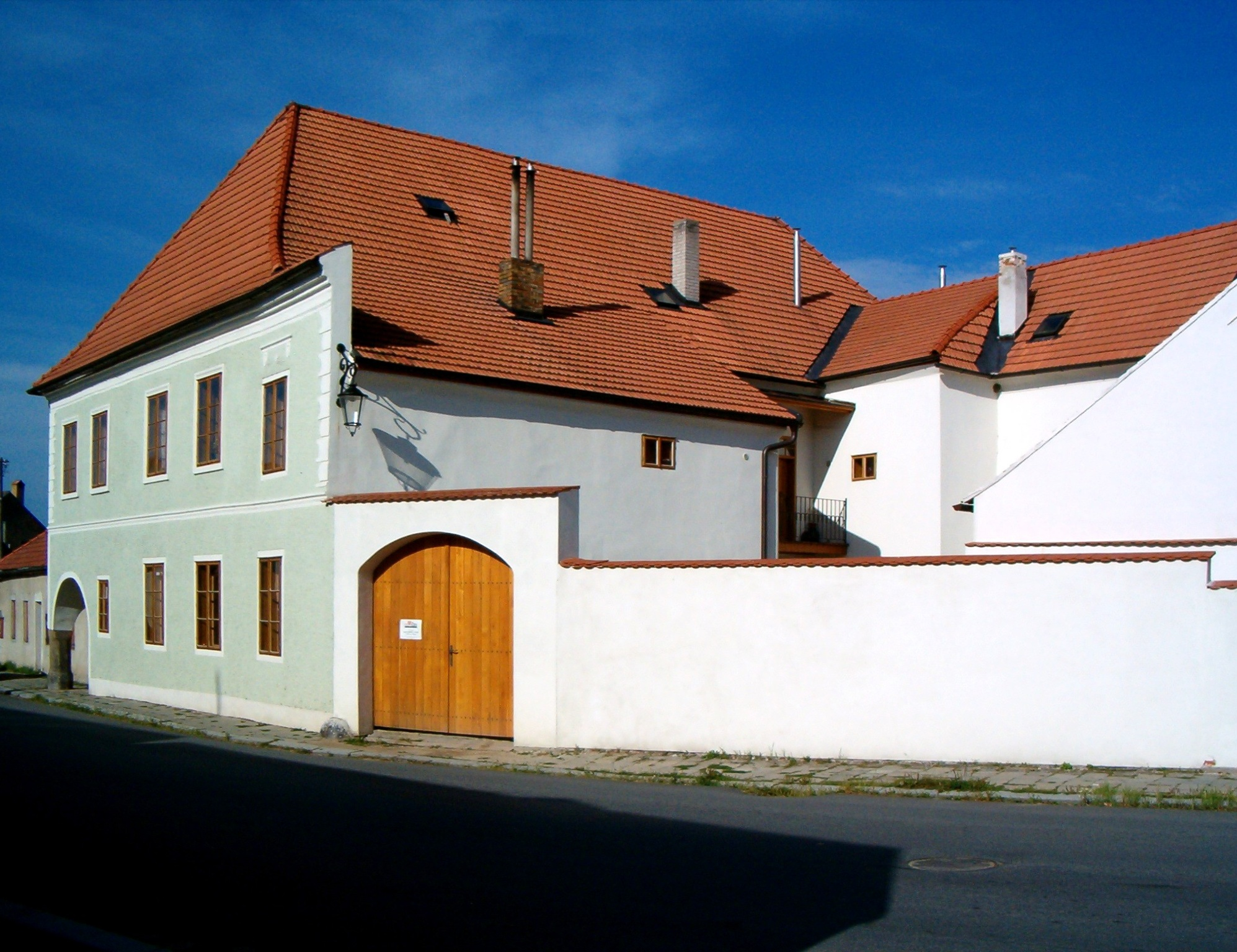 Přepřahací stanice pošty Praha - Vídeň ve Slavonicích